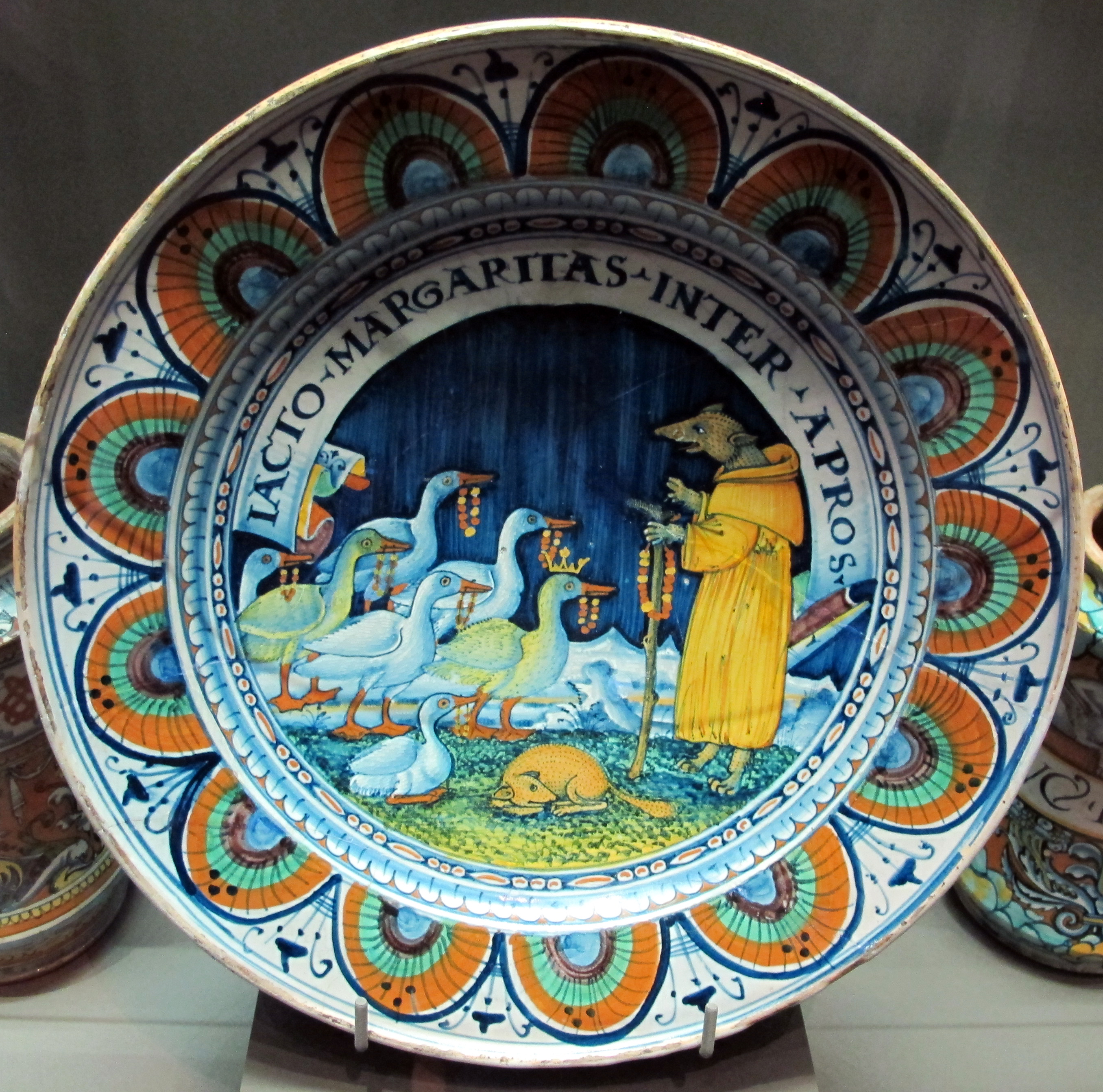 Maiolica del Louvre